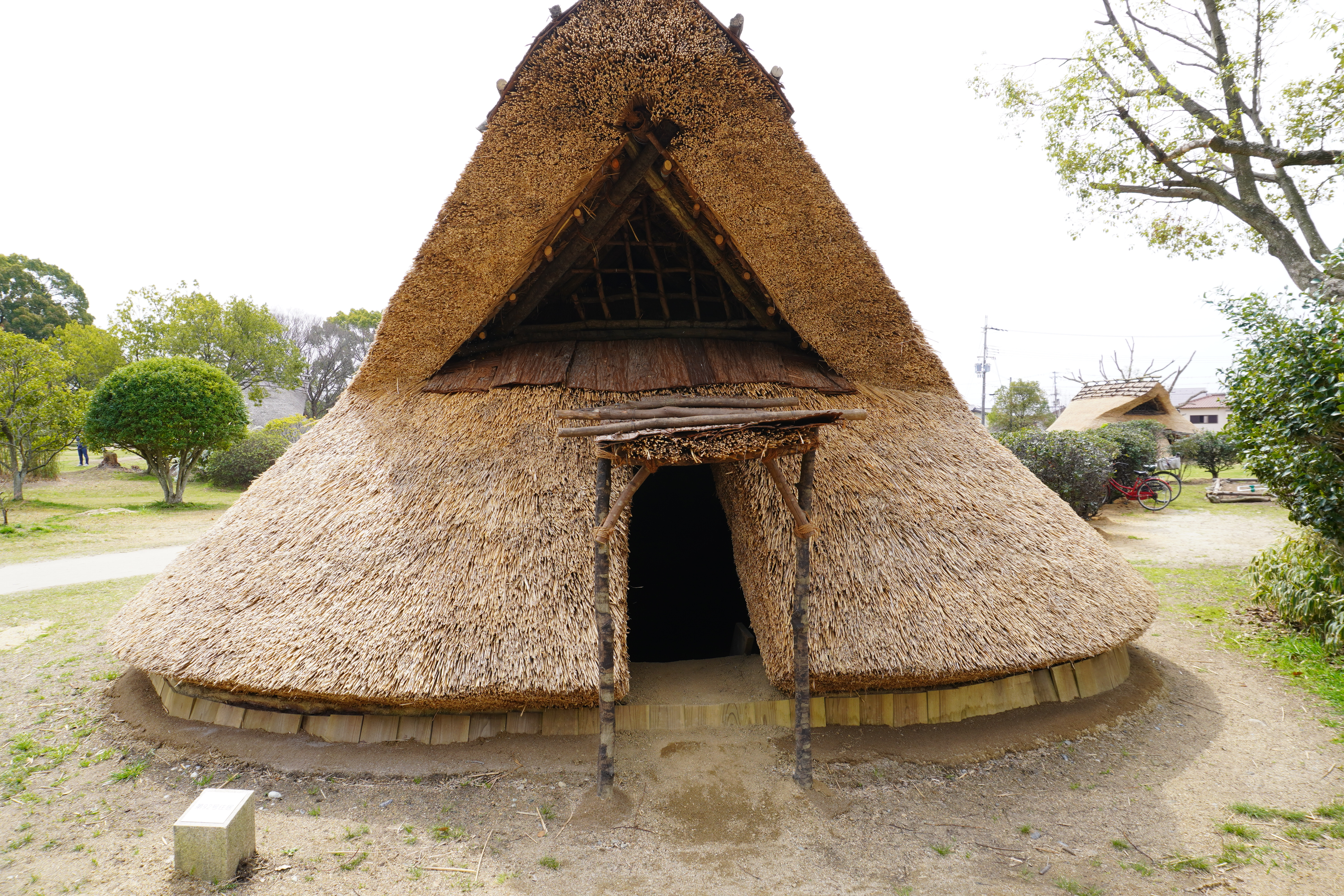 大中遺跡復元住居 (3)